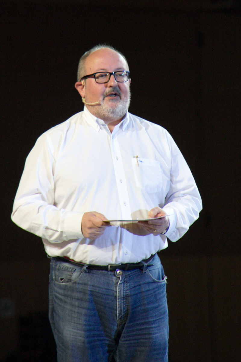 Joan Capdevila i Esteve (1965-), Polític català, diputat a les corts espanyoles per Esquerra Republicana de Catalunya (2016). Foto durant l'Acte central de la campanya "Fem-ho", d'ERC, en favor del referèndum d'independència